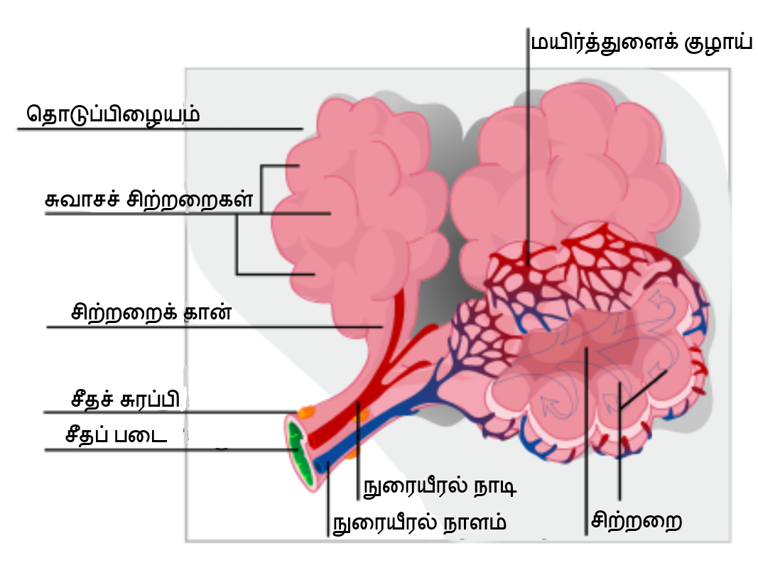 சுவாசச் சிற்றறையின் கட்டமைப்பு